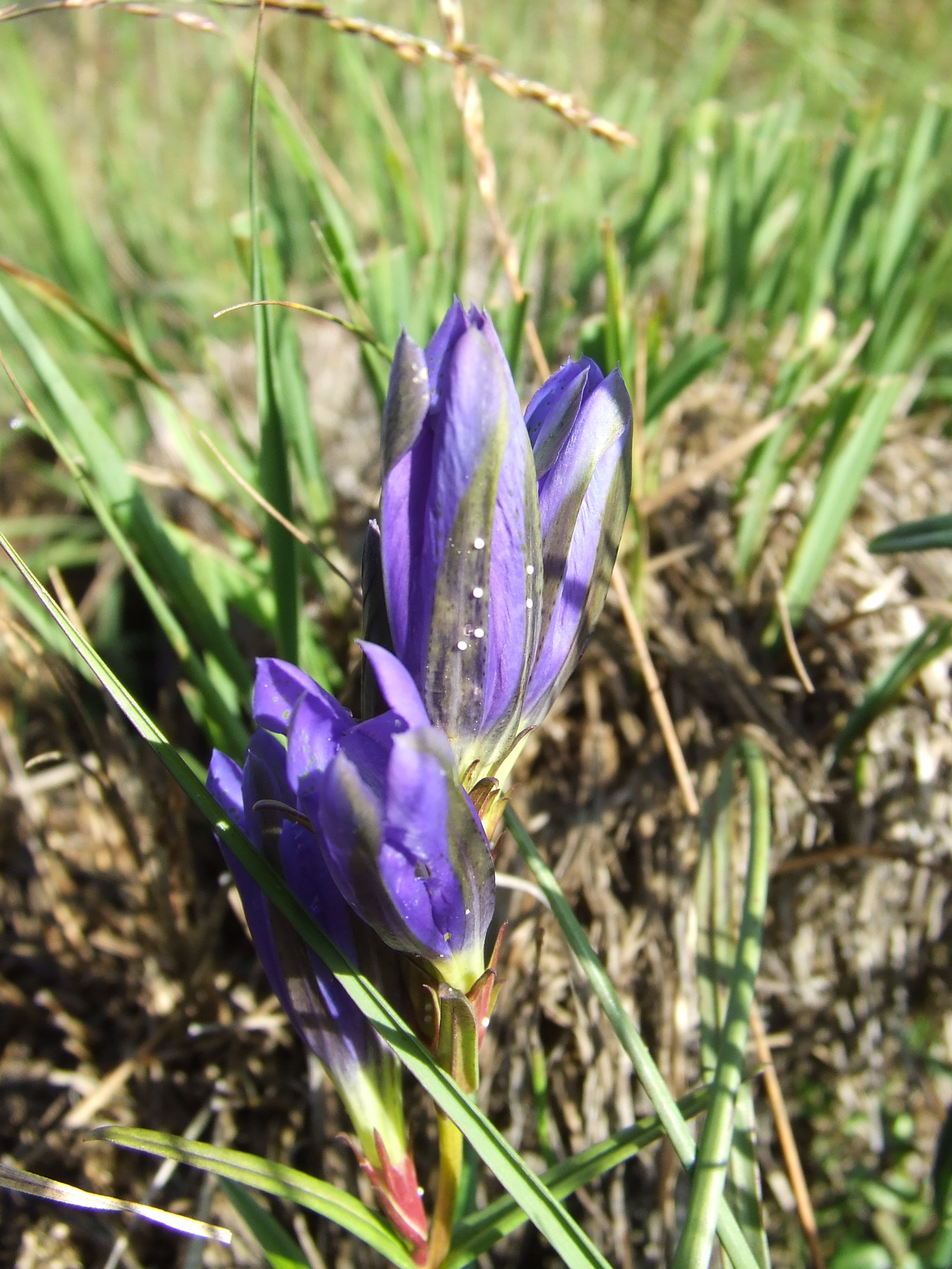 Gentiane pneumonanthe avec des oeufs du papillon Maculinea alcon Azuré des mouillères. *Prairie humide, Réserve naturelle des Sagnes de la Godivelle, département du Puy-de-Dôme, Auvergne, France.